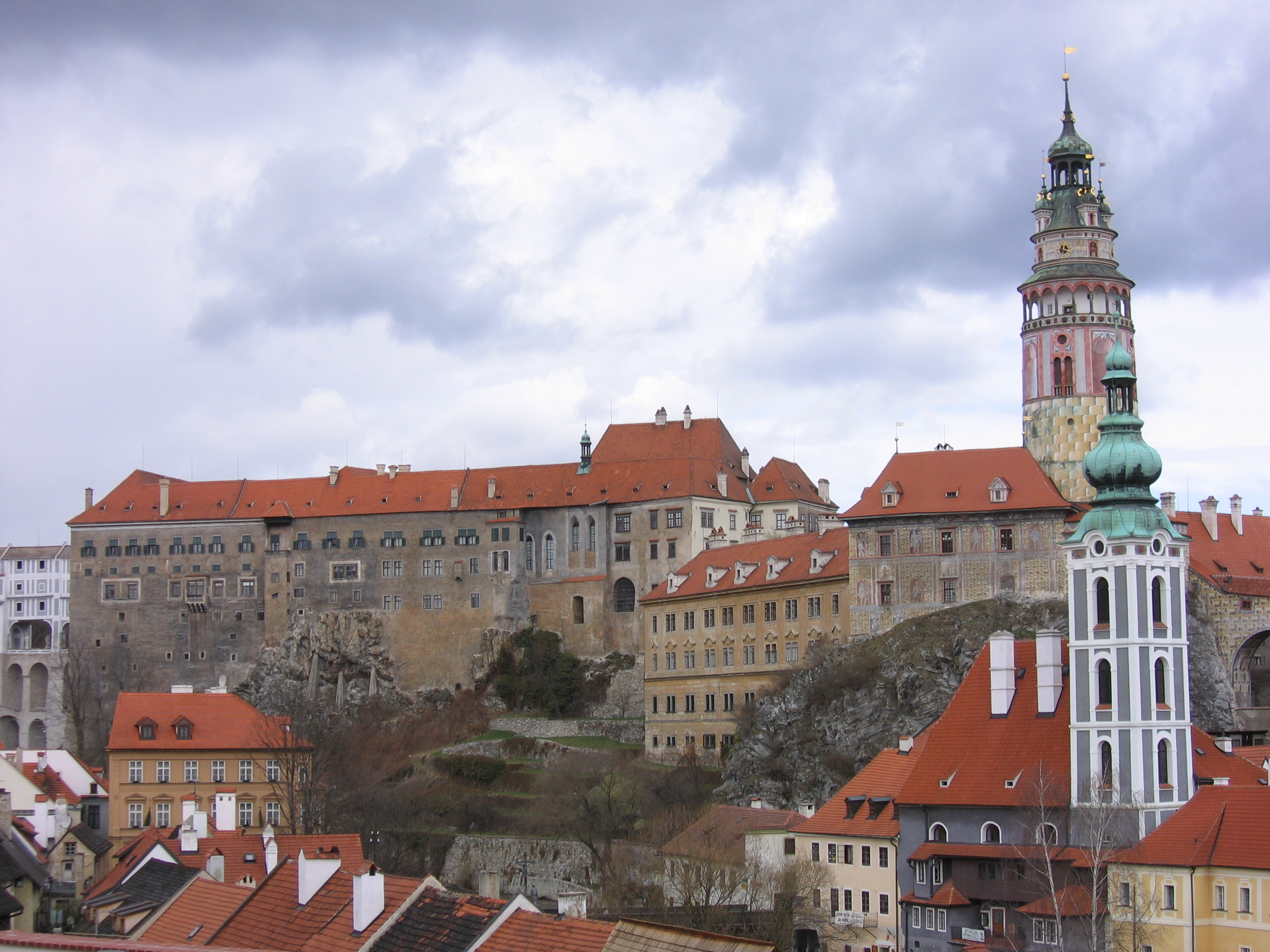 Cesky Krumlov, Czech Republic